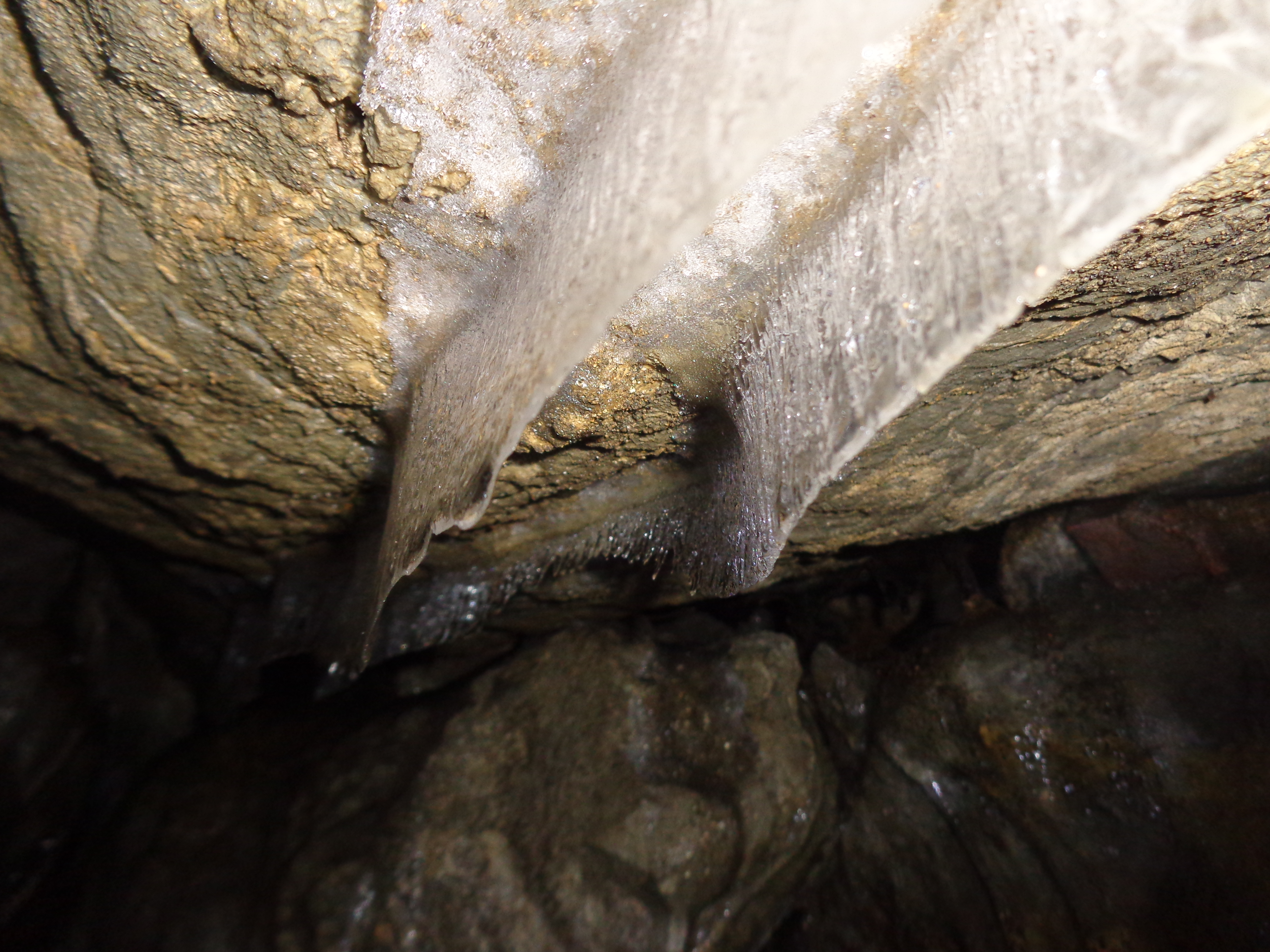 Природное явление, ледяные образования в виде длинных полосок на поверхности потолка пещер